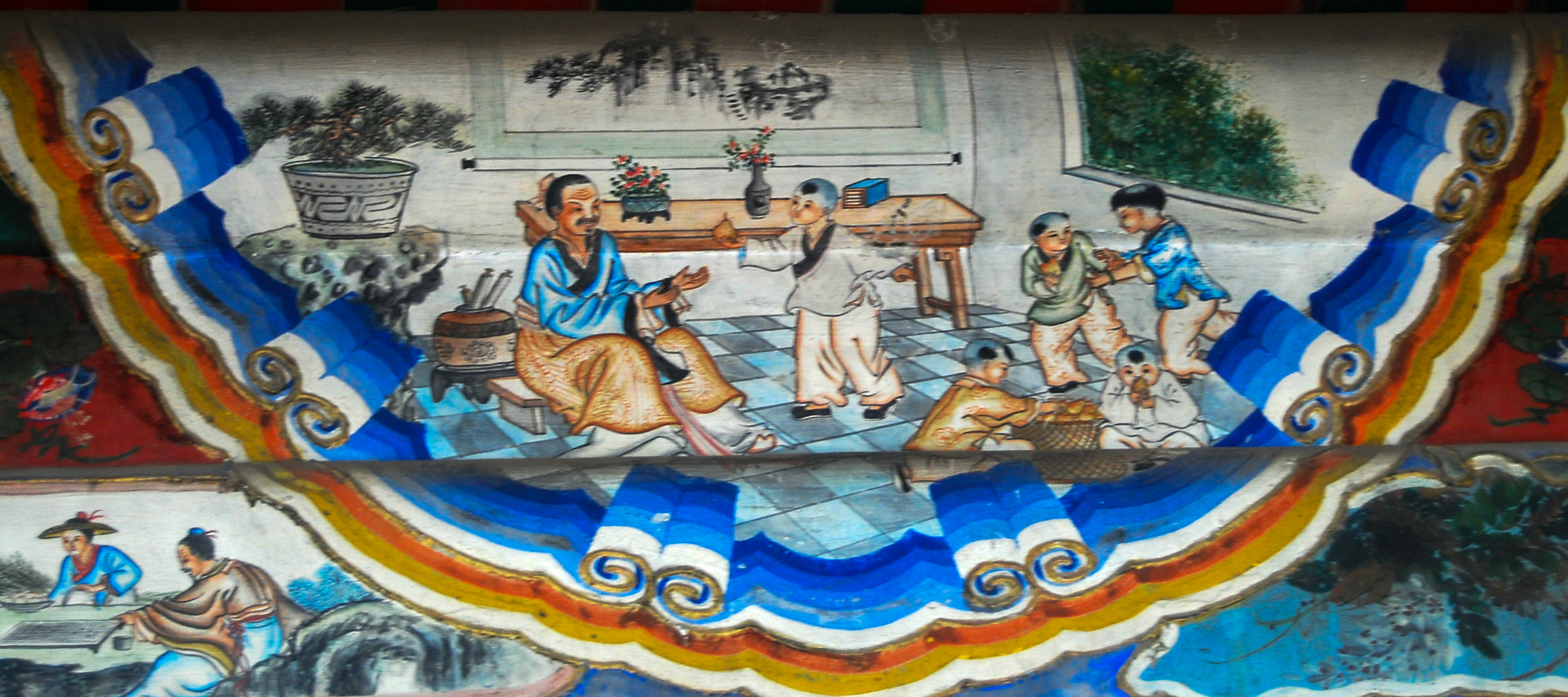 Khổng Dung nhượng lê - Di Hòa Viên